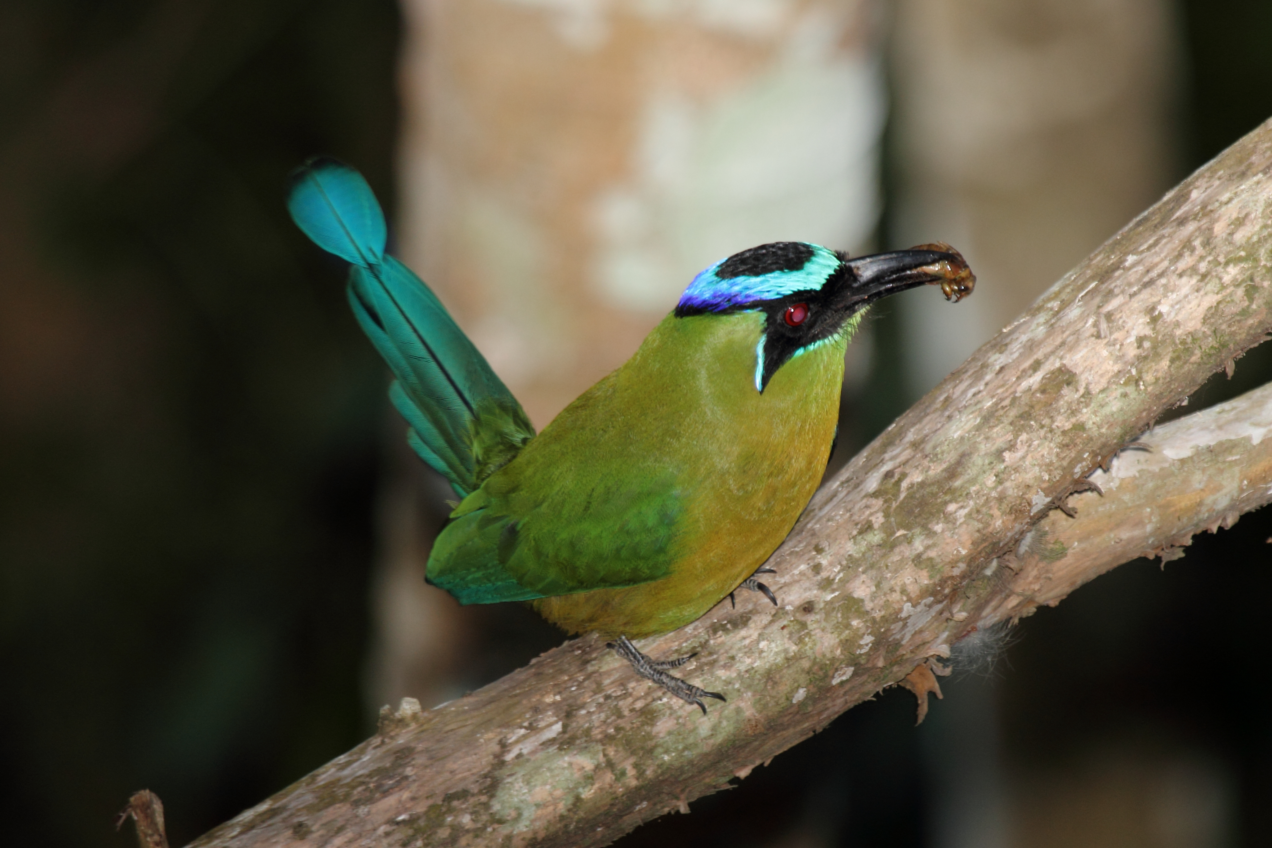 Blue-diademed Motmot Momotus lessonii, Belize